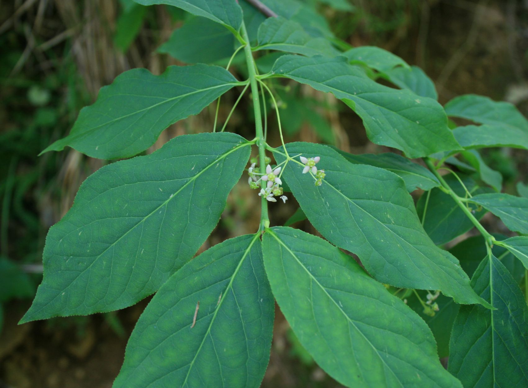 Voralpen-Spindelstrauch (Euonymus latifolius), Baumwürgergewächse (Celastraceae) - Italien/Italia/Italy: Toscana, Prov. Lucca, Parco Regionale delle Alpi Apuane, W Fornovolasco